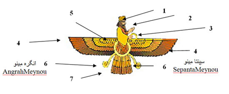 فروهر